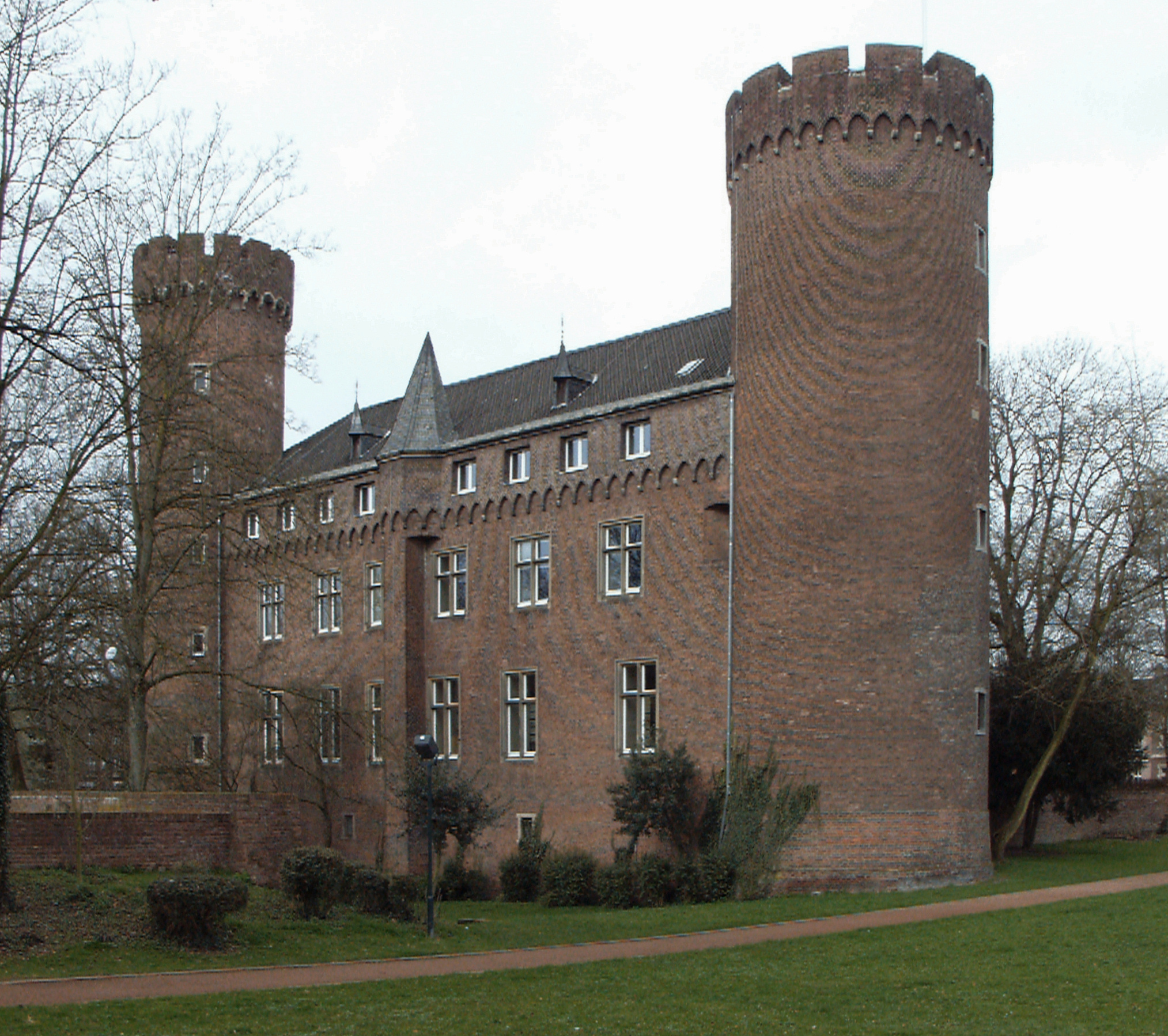 Die Burg Kempen This image shows a heritage building in Germany, located in the North Rhine-Westphalian city Kempen (no. 2).